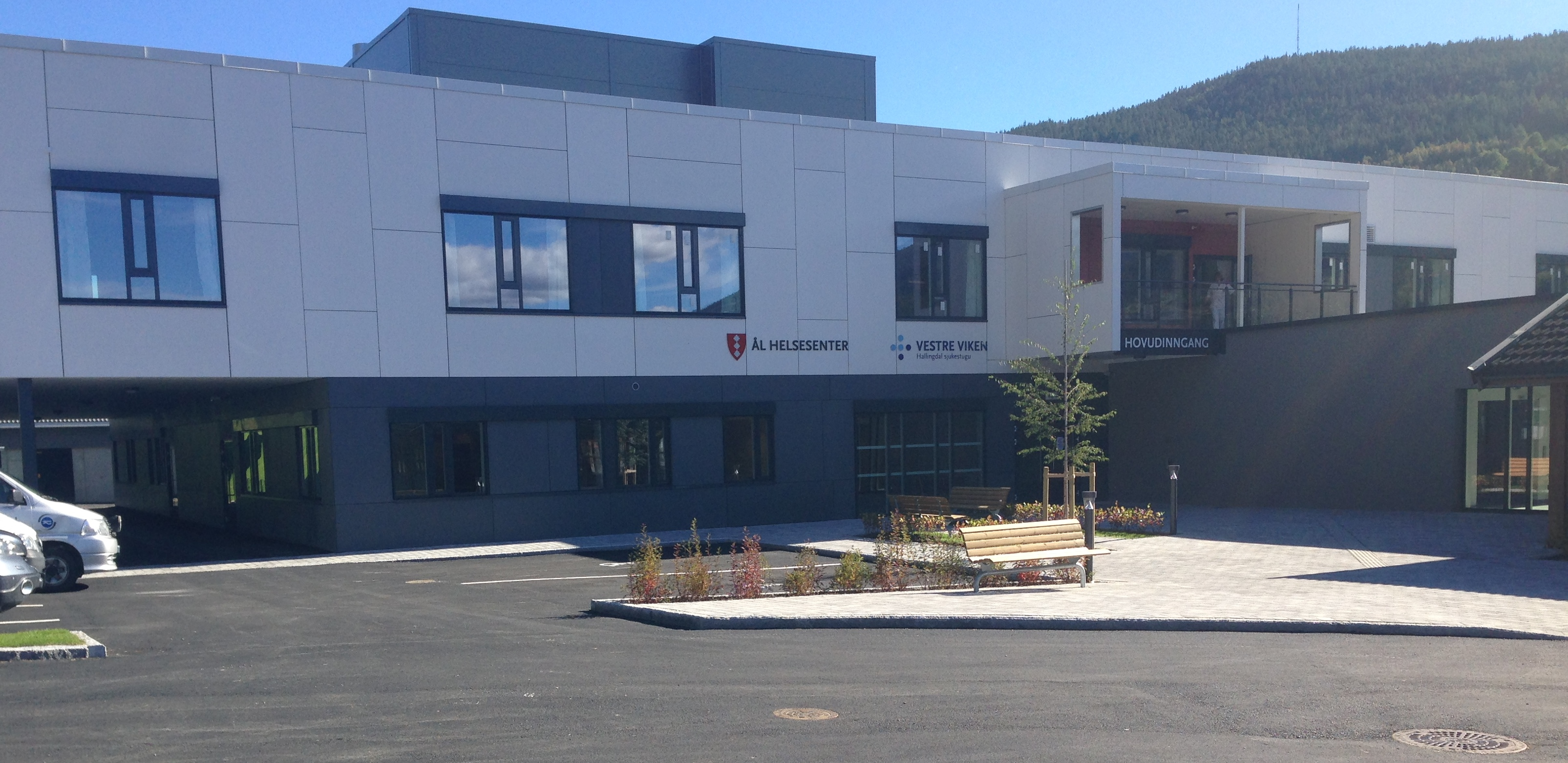 HSS etter siste utbygging i 2016